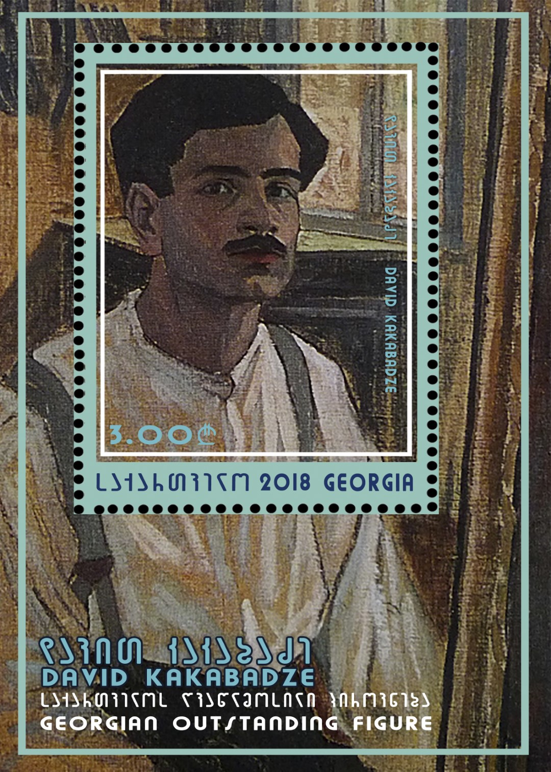 დ. კაკაბაძე საფოსტო მარკა. ავტორი გოგა ქართველიშვილი. 2018